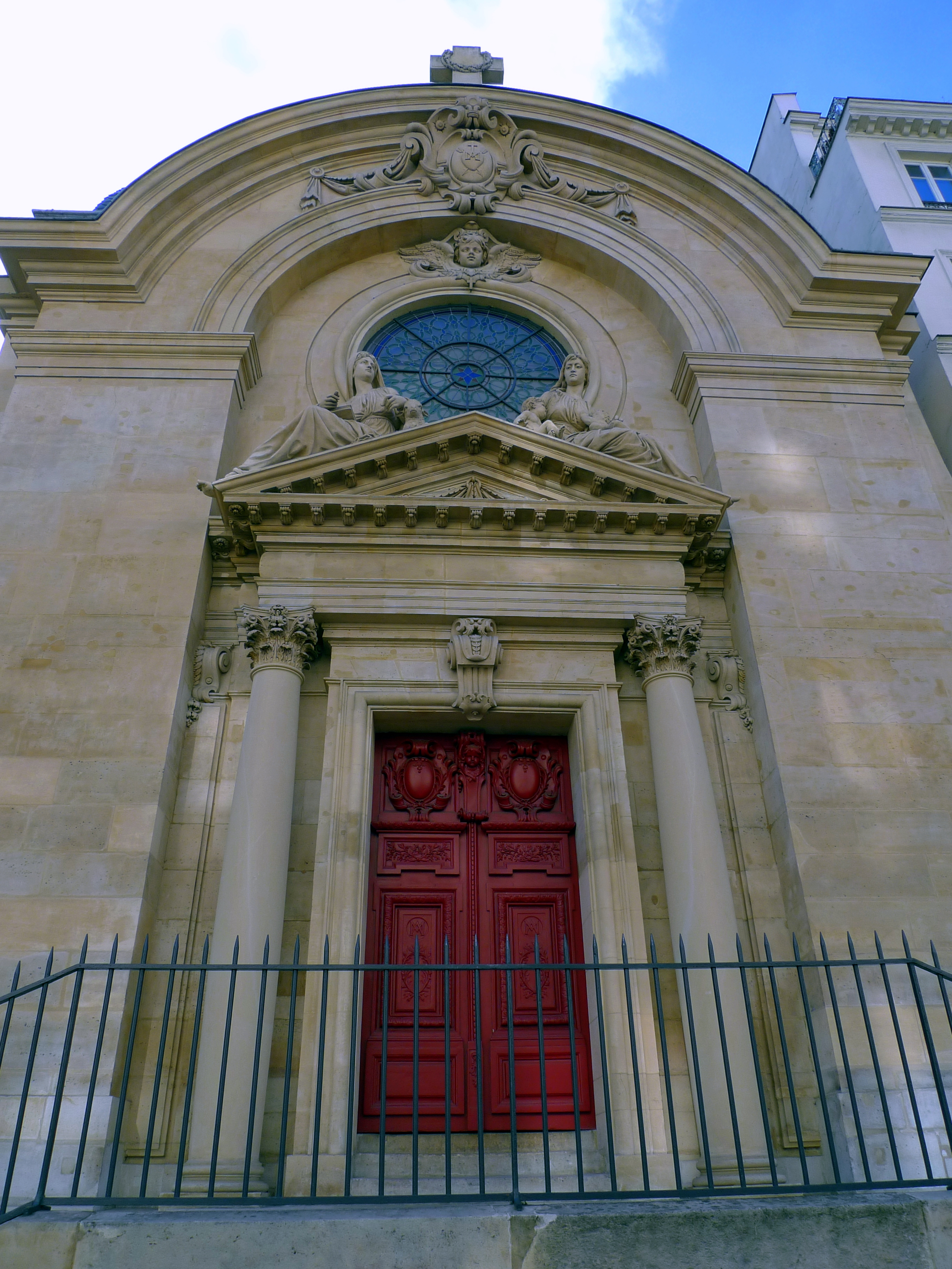 Le Temple Sainte-Marie de la rue Saint-Antoine à Paris